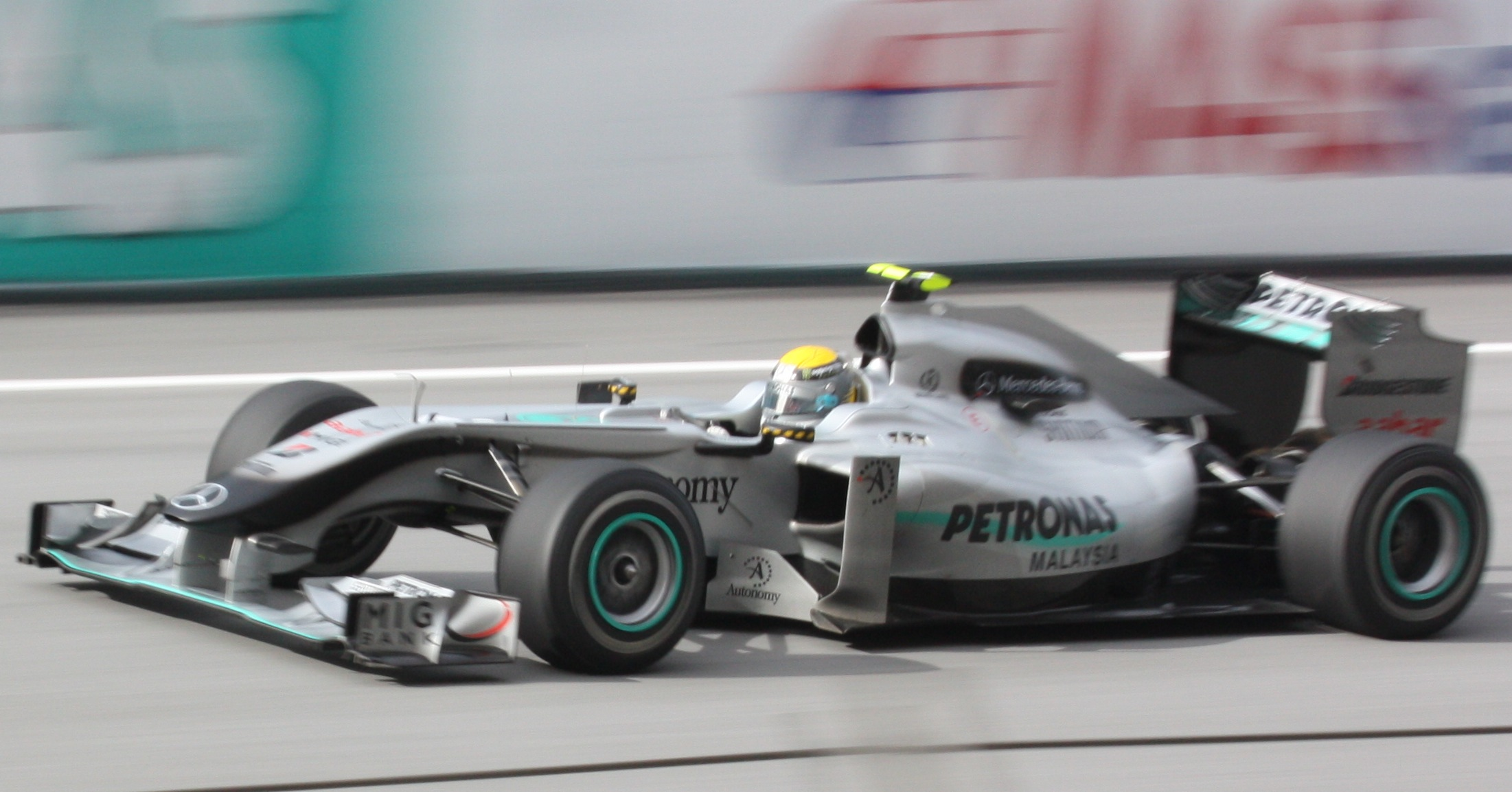 Rosberg malaysia